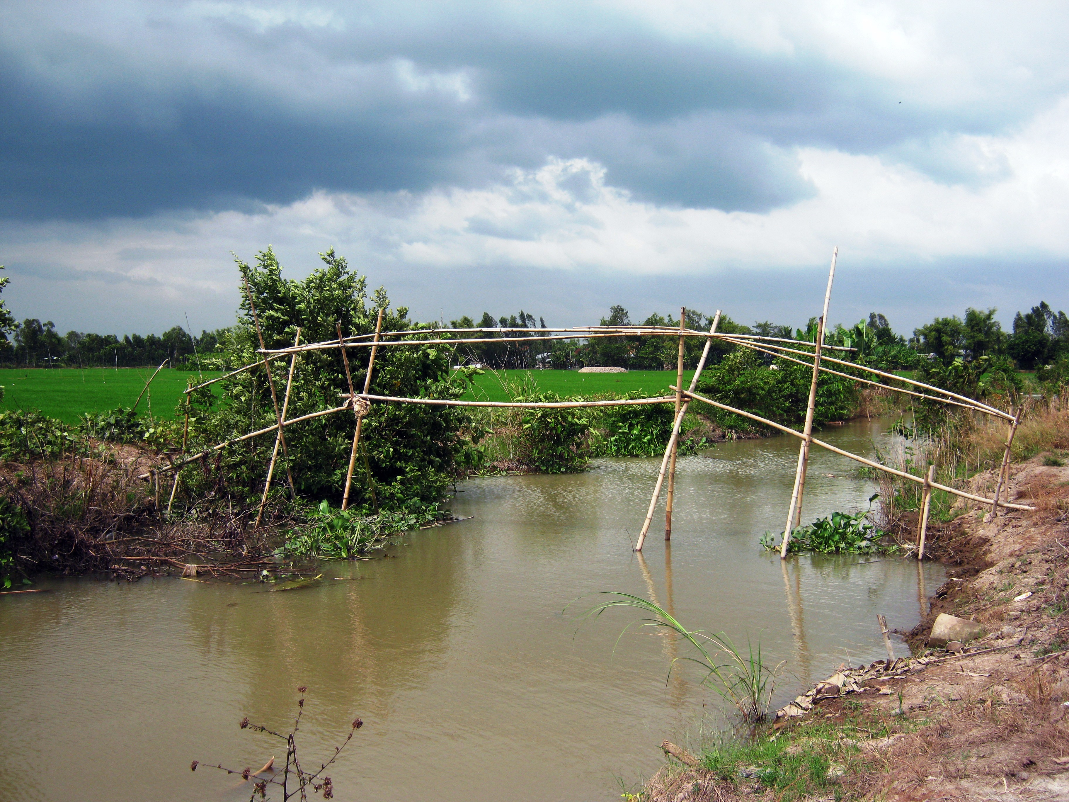 Cầu khỉ bắc bằng cây tre ở Vĩnh Trạch (Thoại Sơn, An Giang).